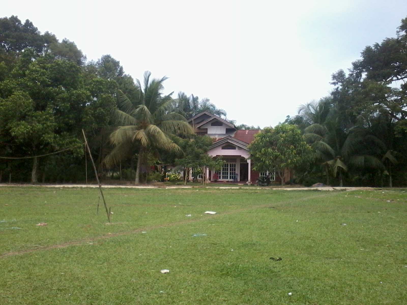 Home Sweet Home